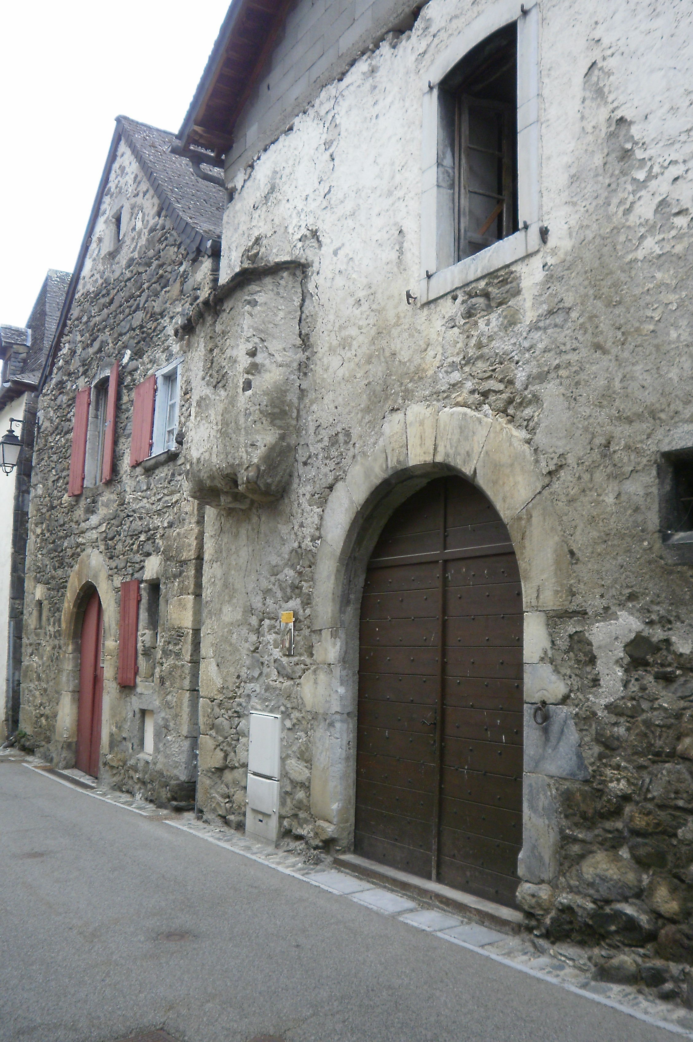 Four à pain datant de l'époque médiévale, Borce, France.